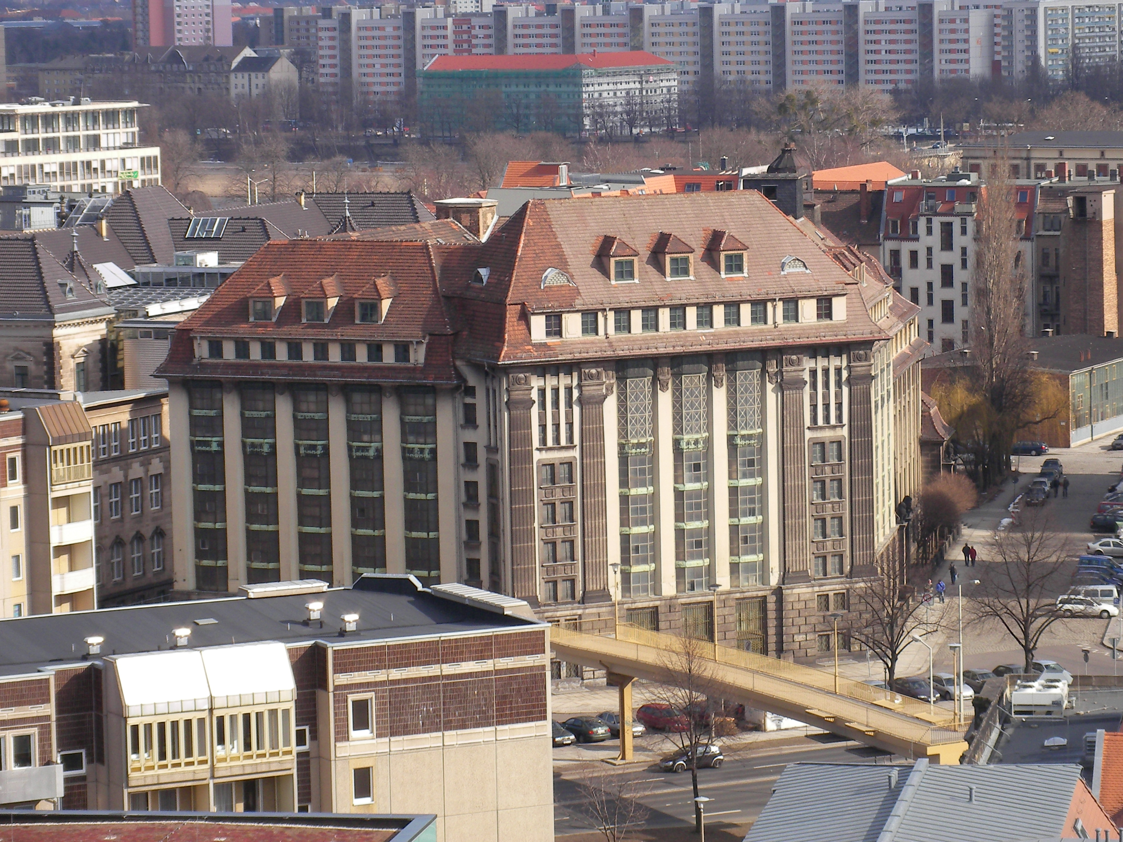 Sächsisches Staatsarchiv, Hauptstaatsarchiv Dresden, Archivstr. 14, erbaut 1912–1915 von Ottomar Reichelt und Heinrich Koch